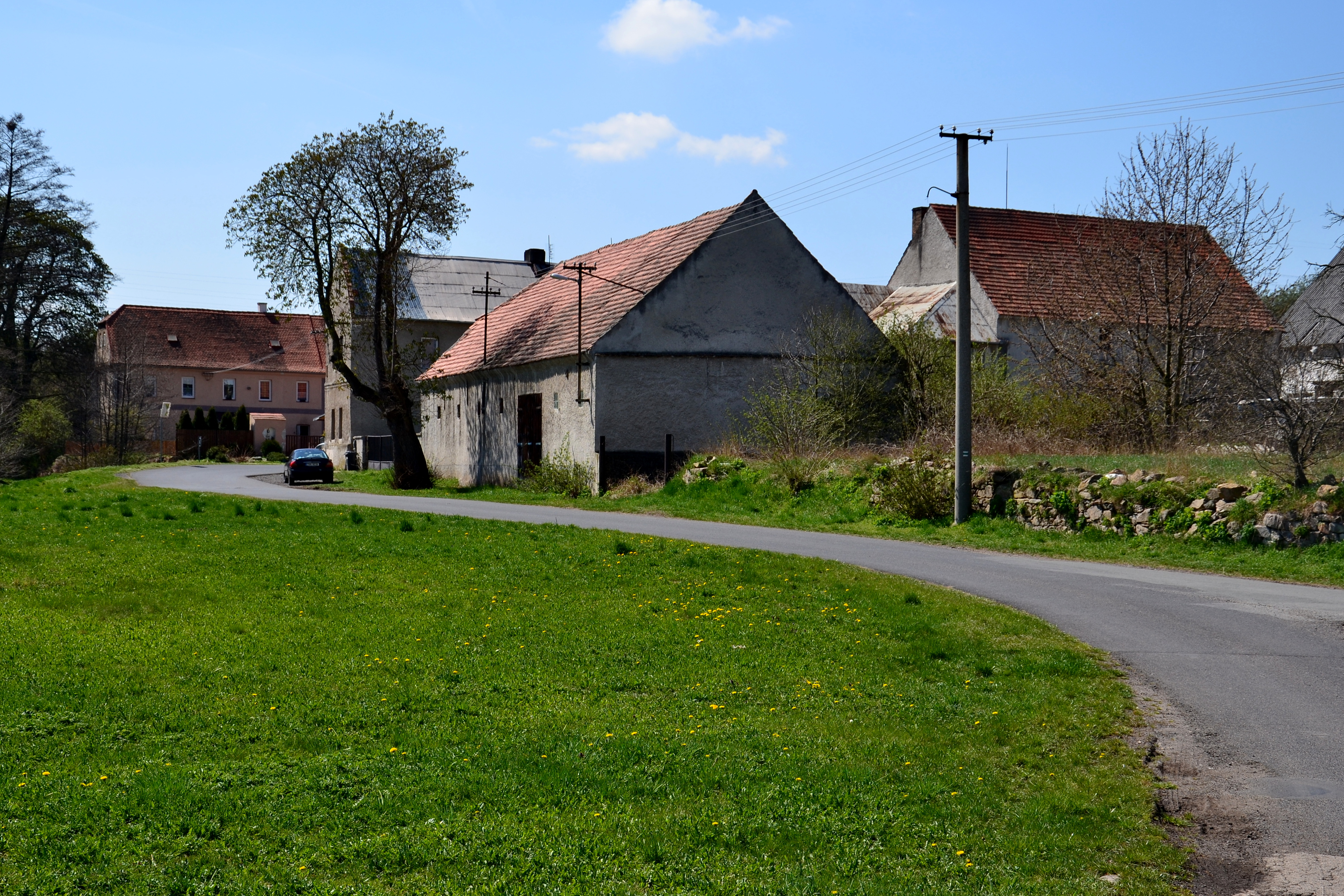 Statek v jižní části vesnice